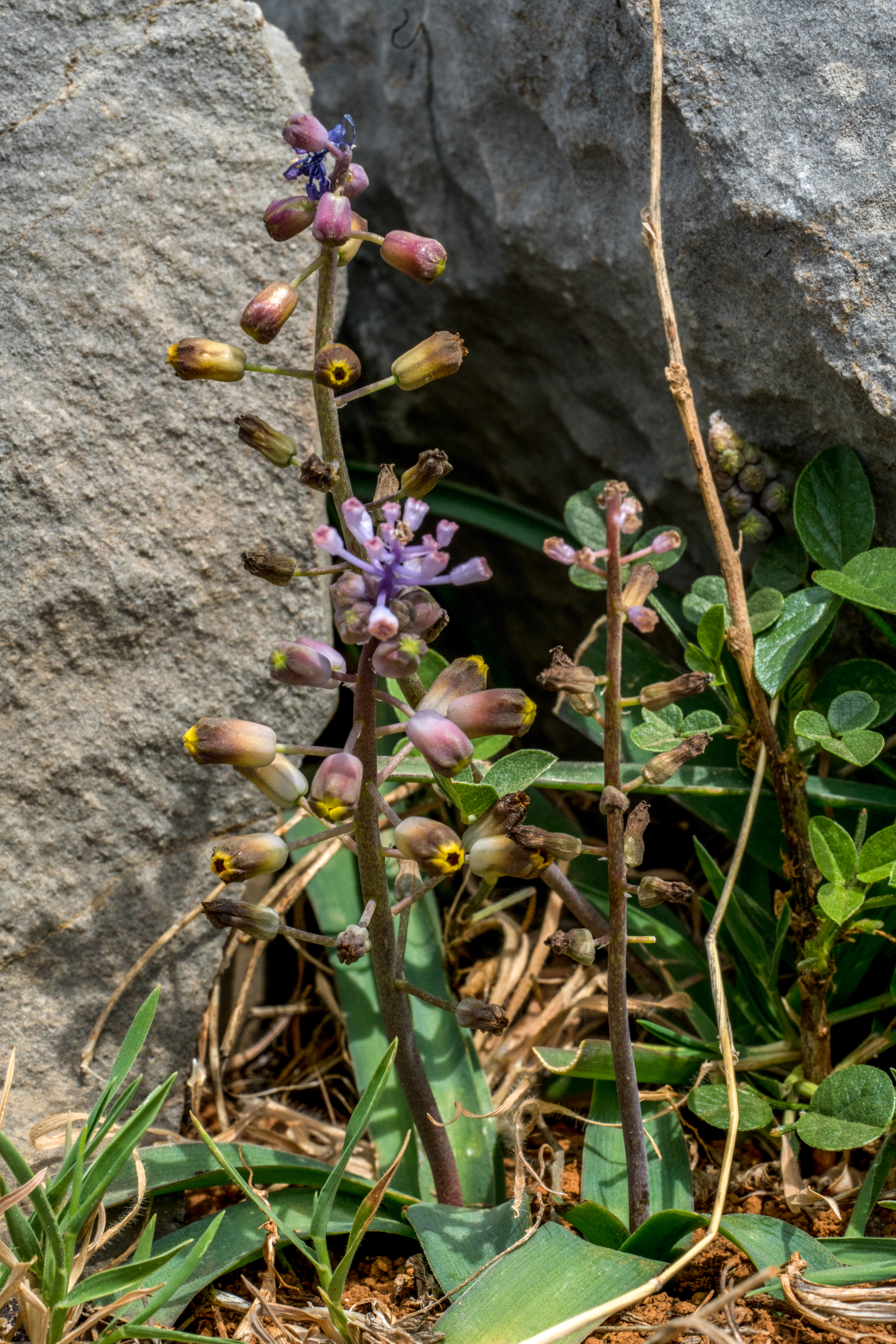 Muscari spreitzenhoferi, Kreta